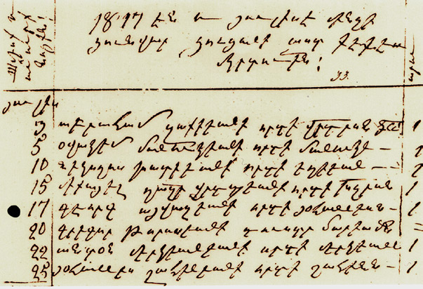 Выписка из метрической книги Феодосийской церкви Сурб Саркис о рождении и крещении И. К. Айвазовского (См. запись 17: «Ованес, сын Геворга Айвазяна» – Ш. Х. Центральный государственный исторический архив Армении. Ф. 320. Оп. 1. Д. 78.)